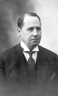 Hugo Kaho